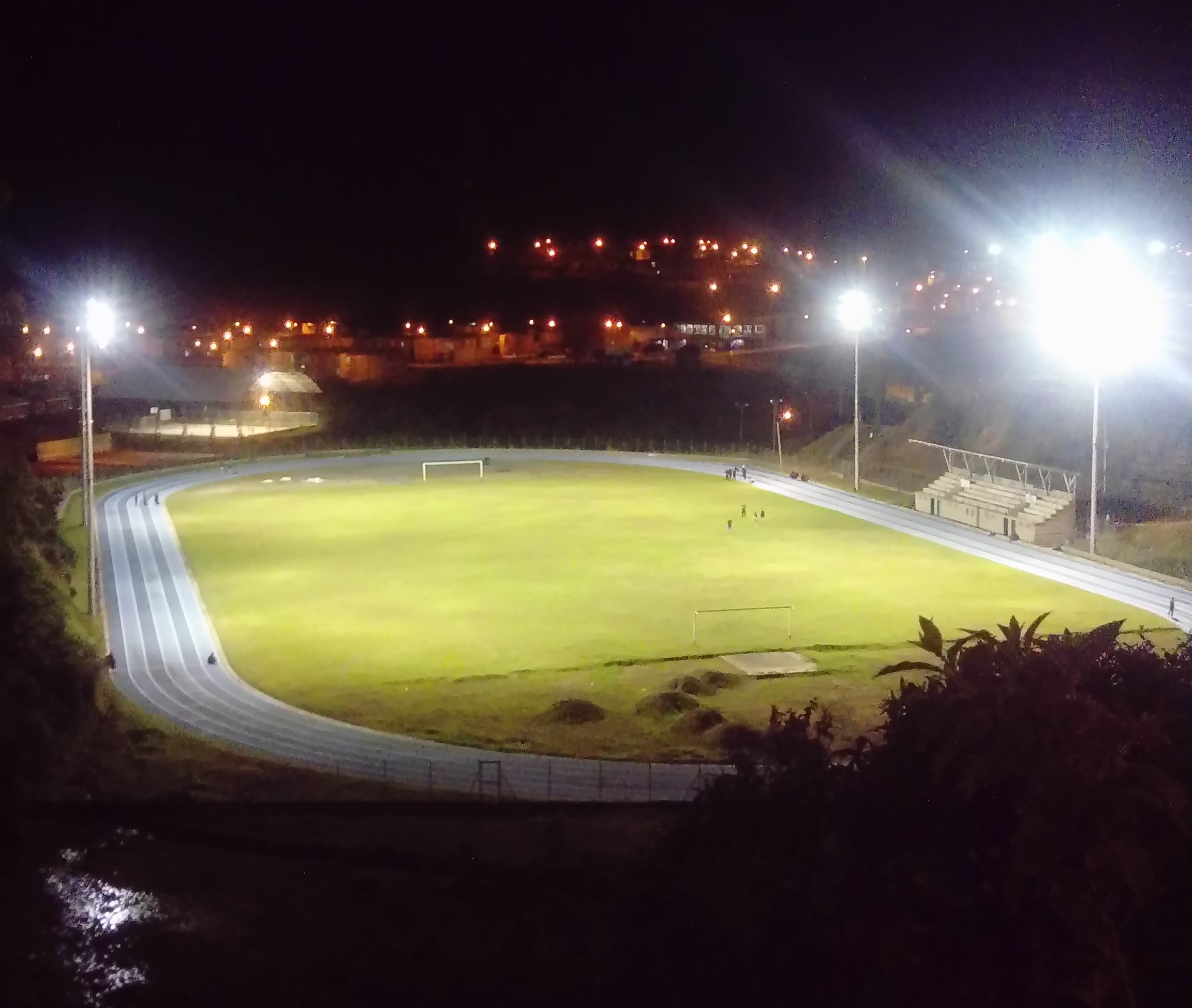 Cancha y pista de atletismo, Santa Rosa de Osos